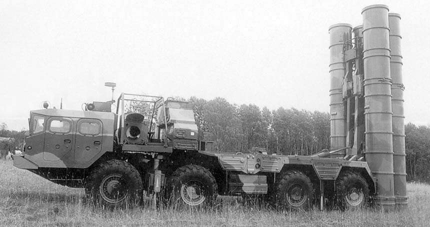 Russian SA-10 TEL